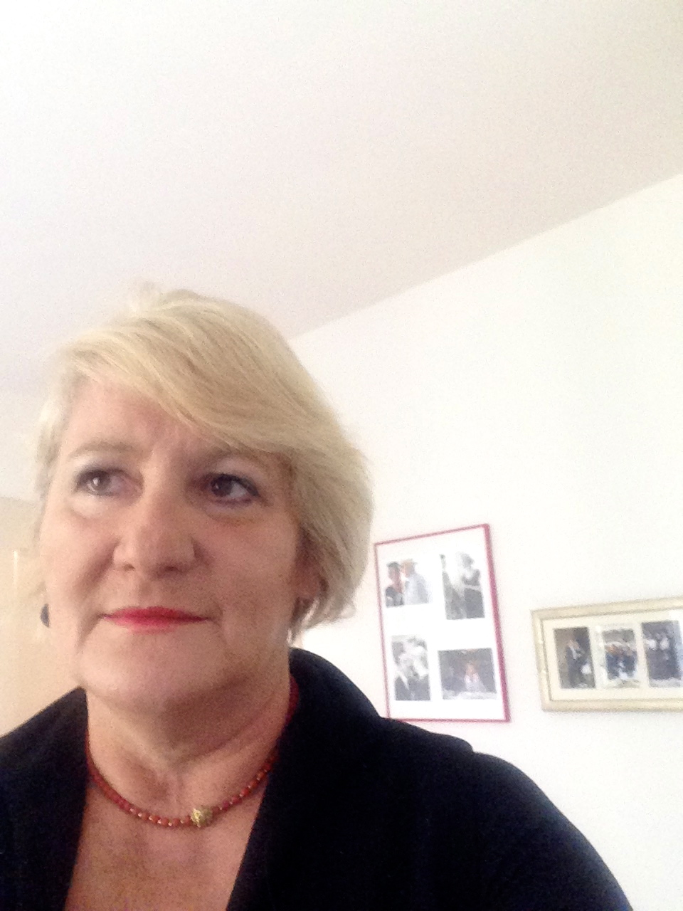 Dragica Rajcic Holzner in Zürich.Oktober 2016